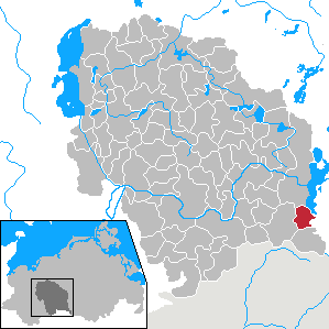 Ganzlin in Mecklenburg-Vorpommern - District Parchim